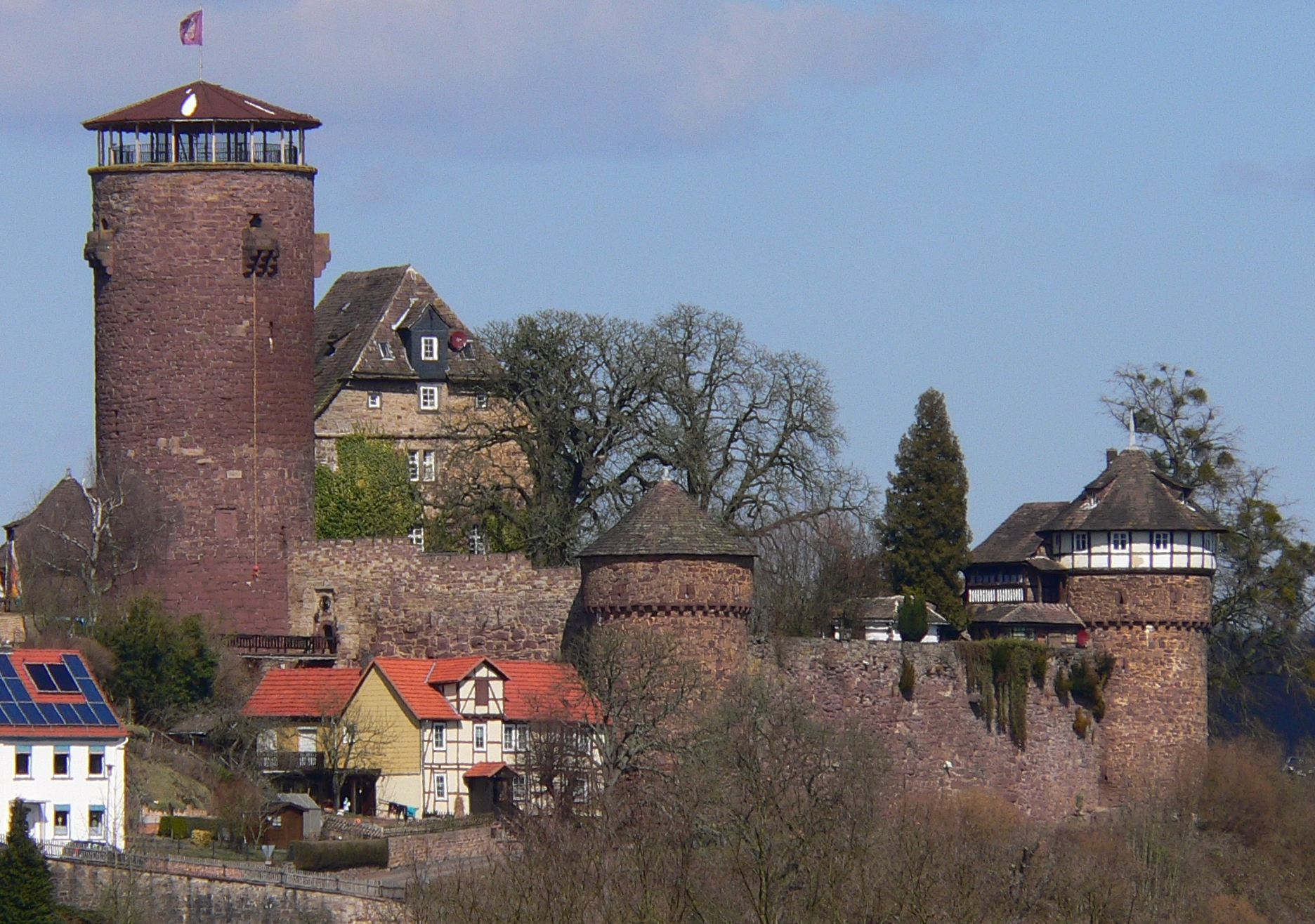 Die Trendelburg - Gesamtansicht, Hessen, Germany